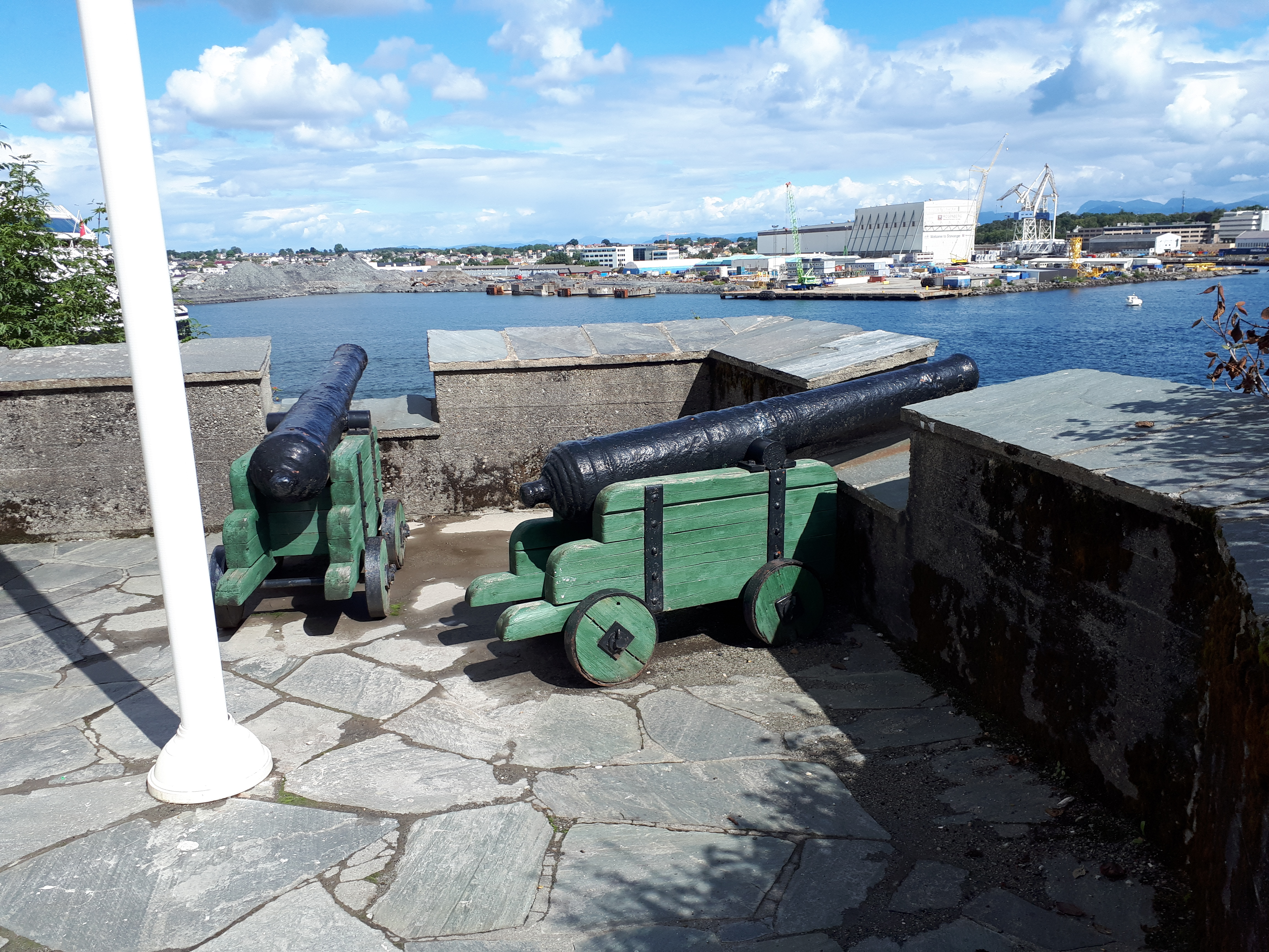 Kanoner som er satt opp på Kalhammaren i Stavanger.